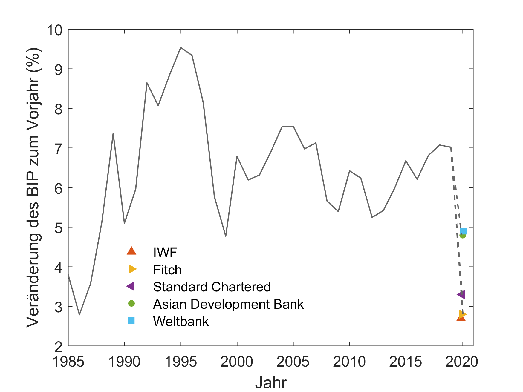 Veränderung des BIP Vietnams zum Vorjahr. Quellen: Prognosen